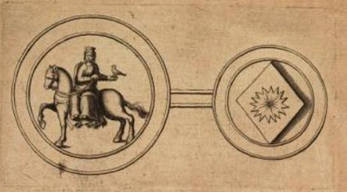 Cecílie z Baux